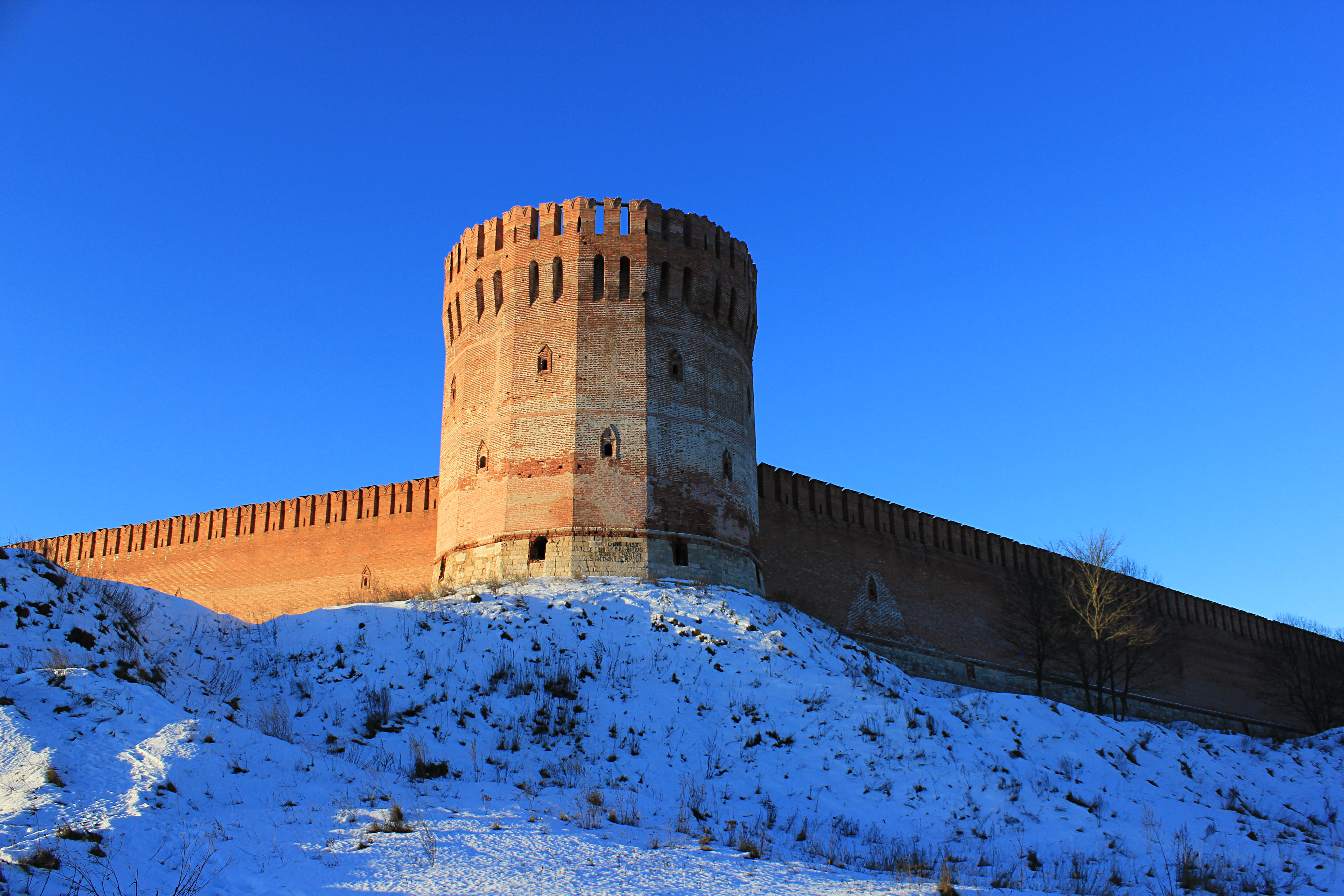 Башня Орел (Городецкая): Смоленск, Смоленский район, Смоленская область